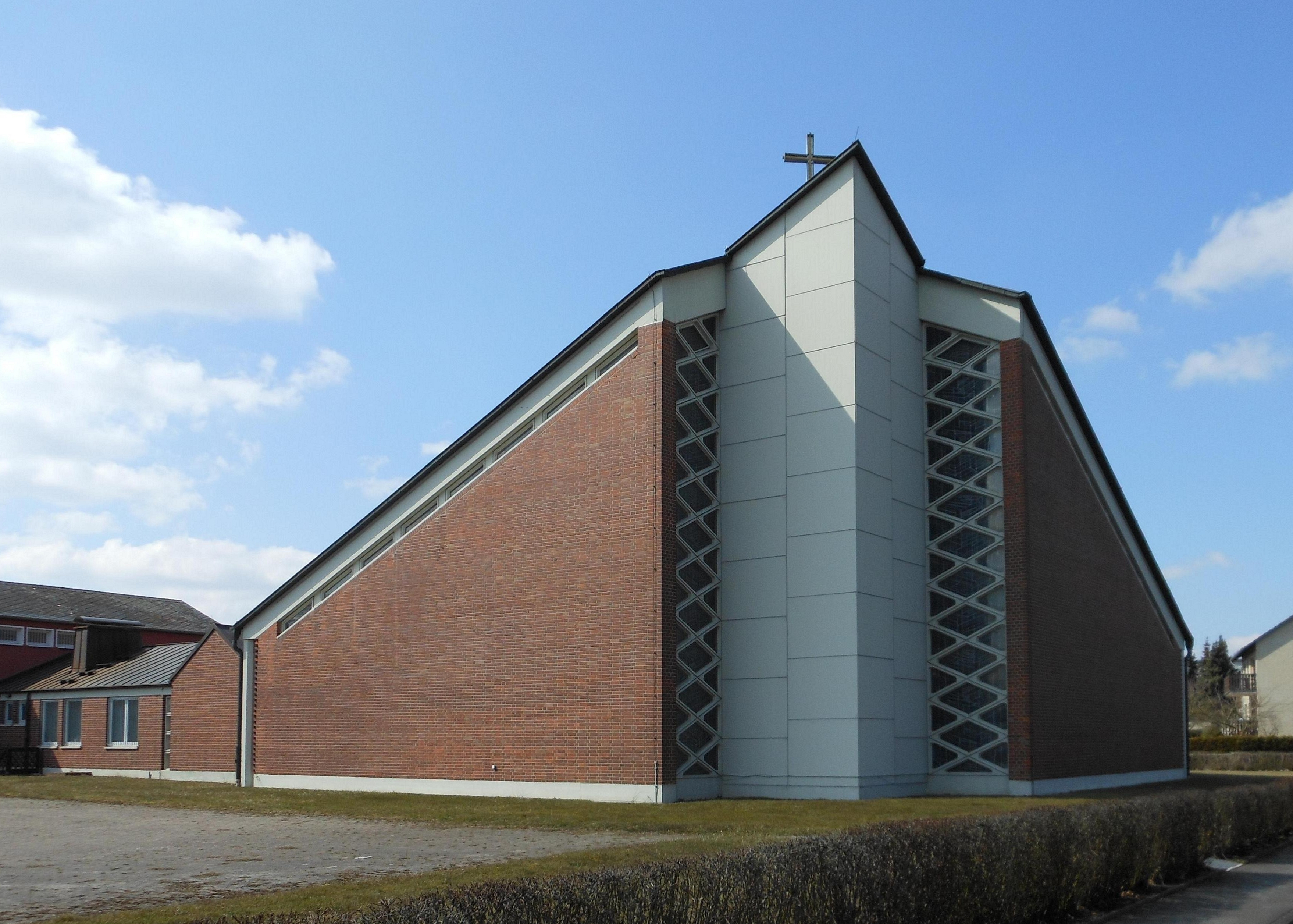 Hohnhorst-Scheller, kath. Kirche St. Petrus Canisius